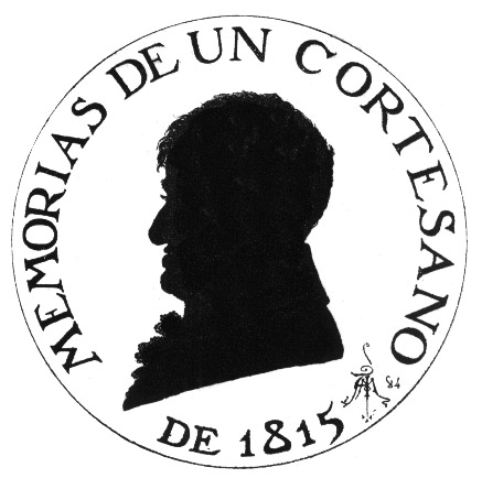 Portada del episodio nacional "Memorias de un cortesano de 1815" (edición de 1884)